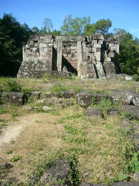 Chedi-Ruine Phu Phek